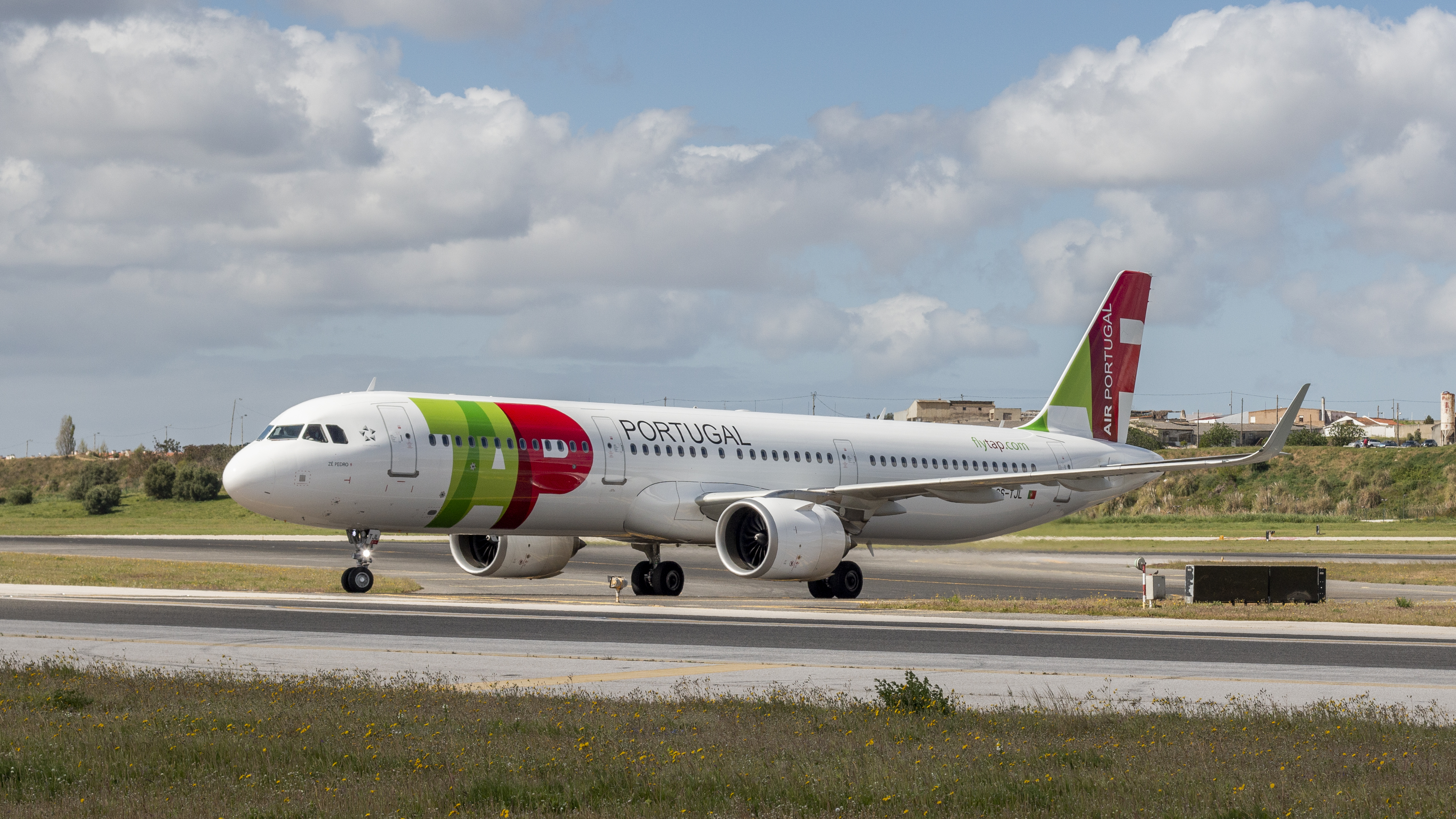 Lisbon, Portugal